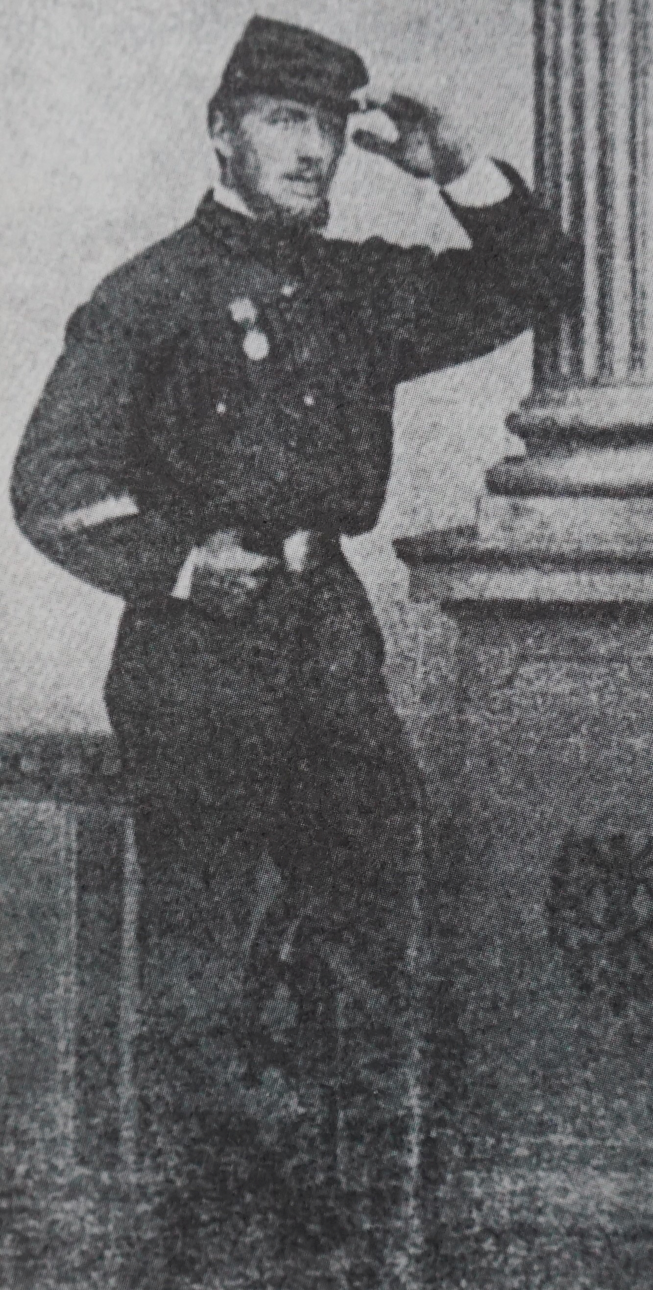 Luigi Wimmer in divisa garibaldina